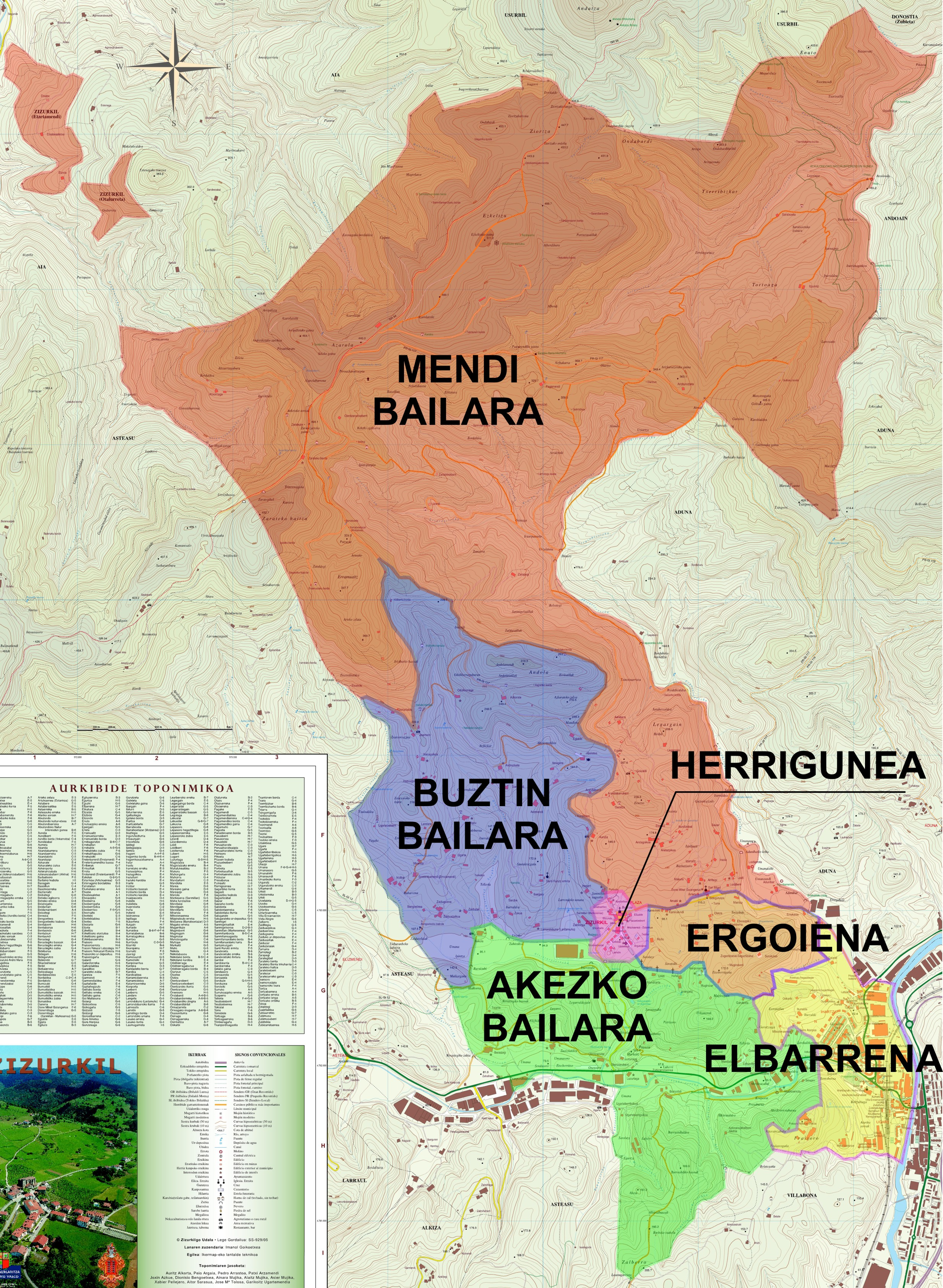 2018an Zizurkilgo Udalak onartu duen antolaketa administratiboa.